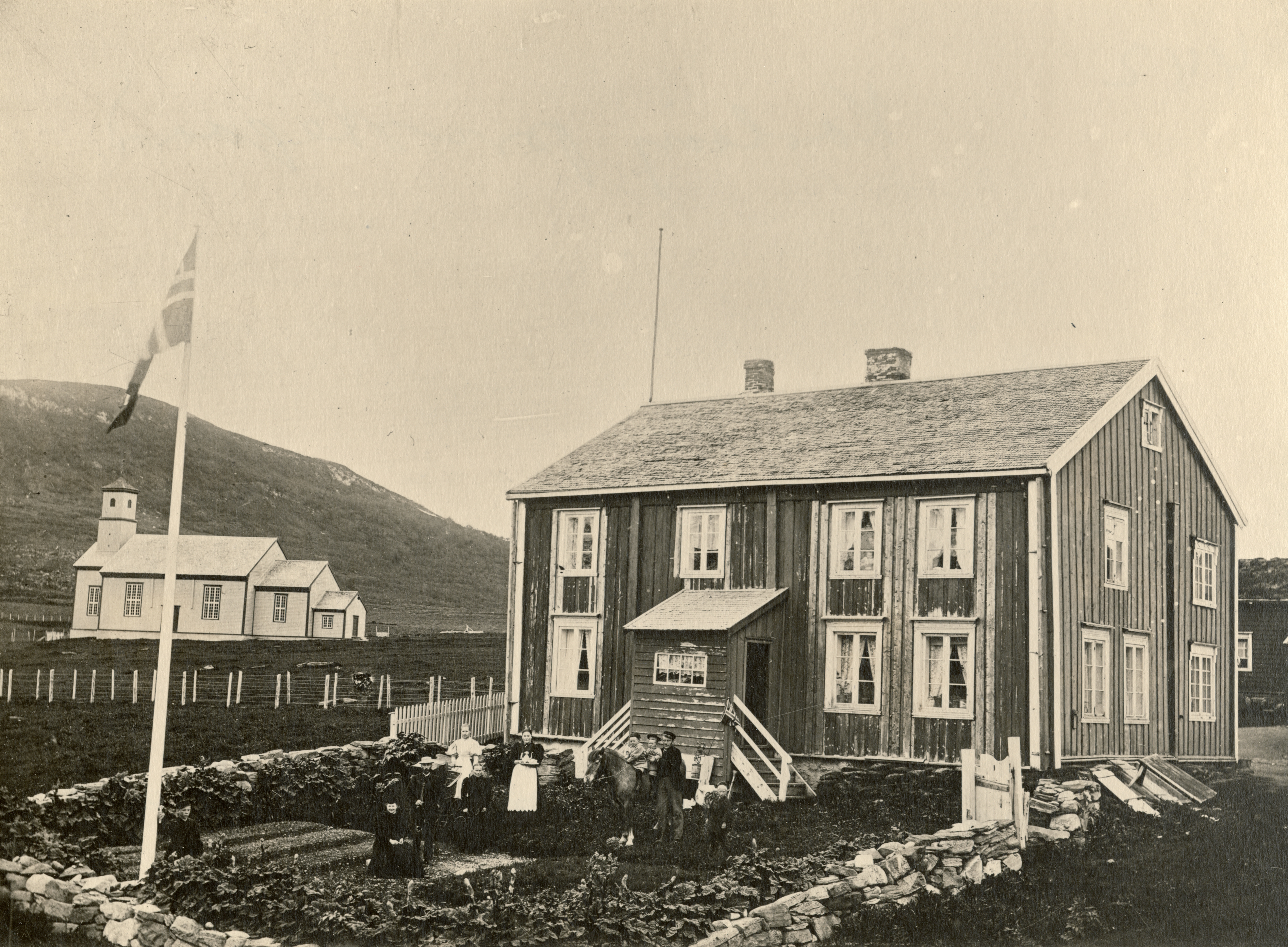 Karlsøy prestegård i Karlsøy, Troms Hovedbyggning fra 1815. Antatt revet 1913. This image on crowdsourcing geotagging platform Fotodugnad